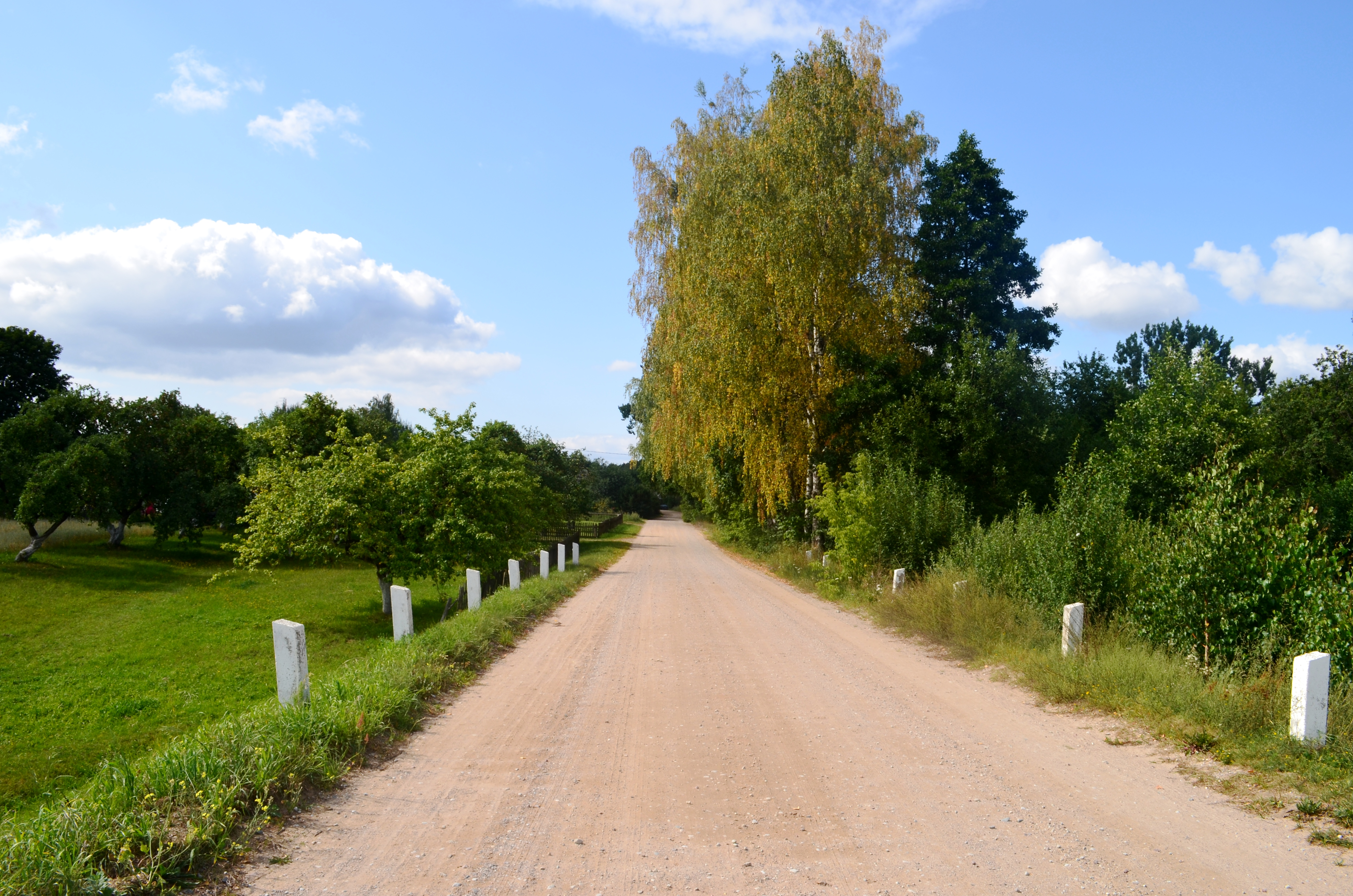 Masališkės, Varėnos raj.